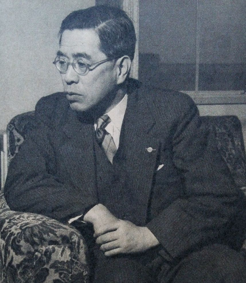 柳田誠二郎